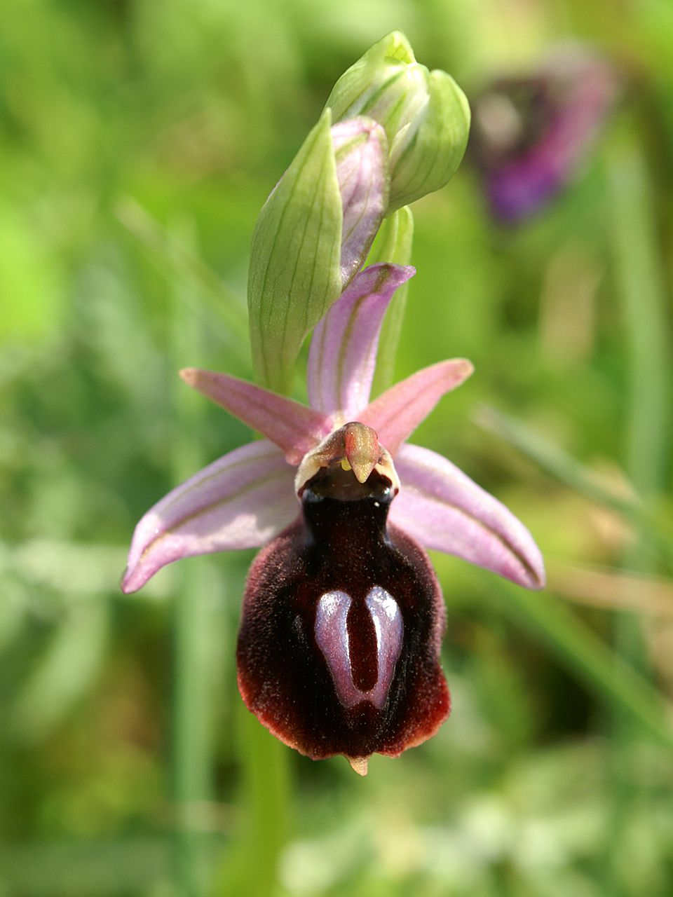 Ophrys ferrum-equinum